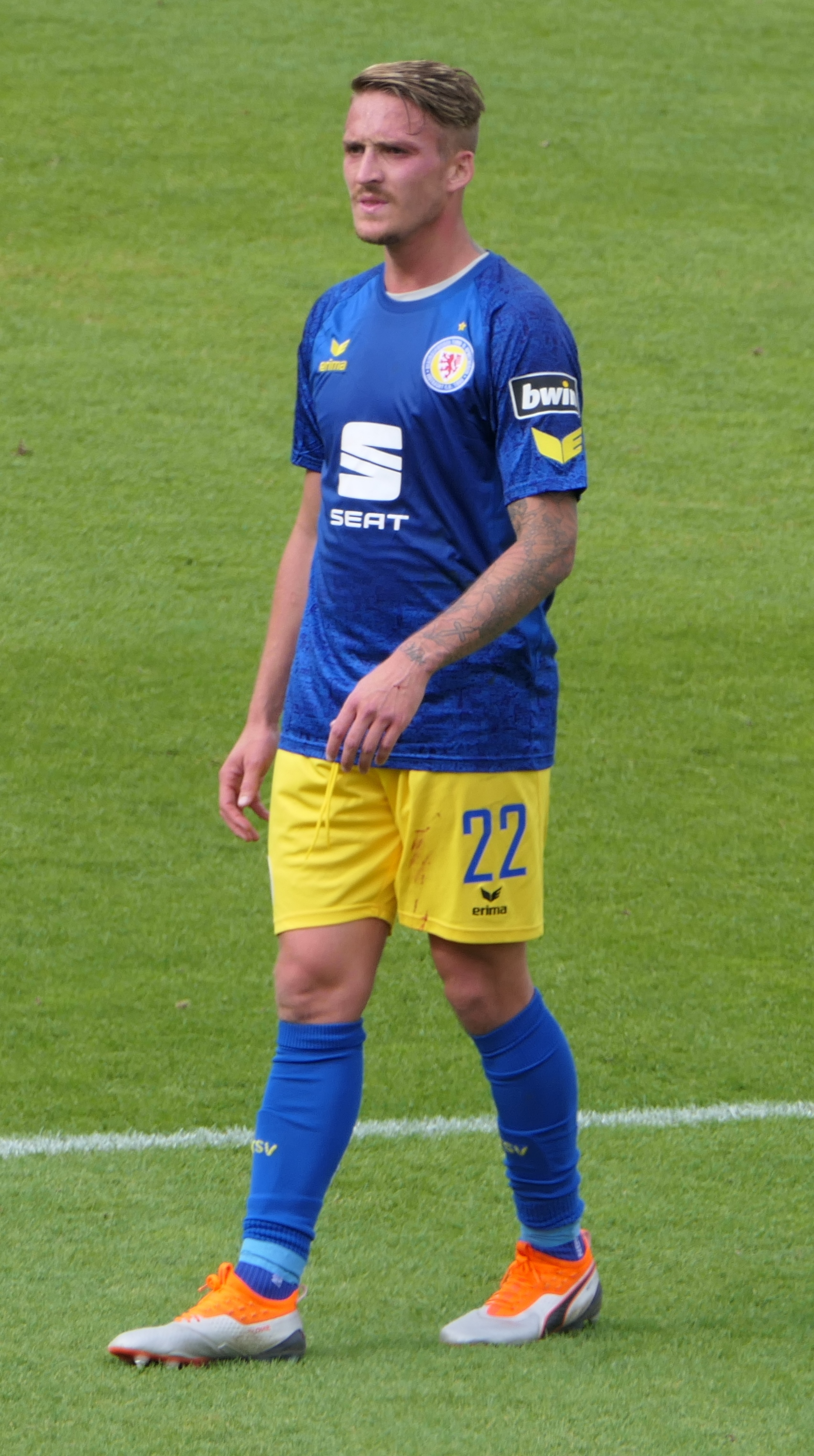 Der Fussballprofi Manuel Janzer im Trikot von Eintracht Braunschweig beim Auswärtsspiel bei den Würzburger Kickers am 22.09.2018.